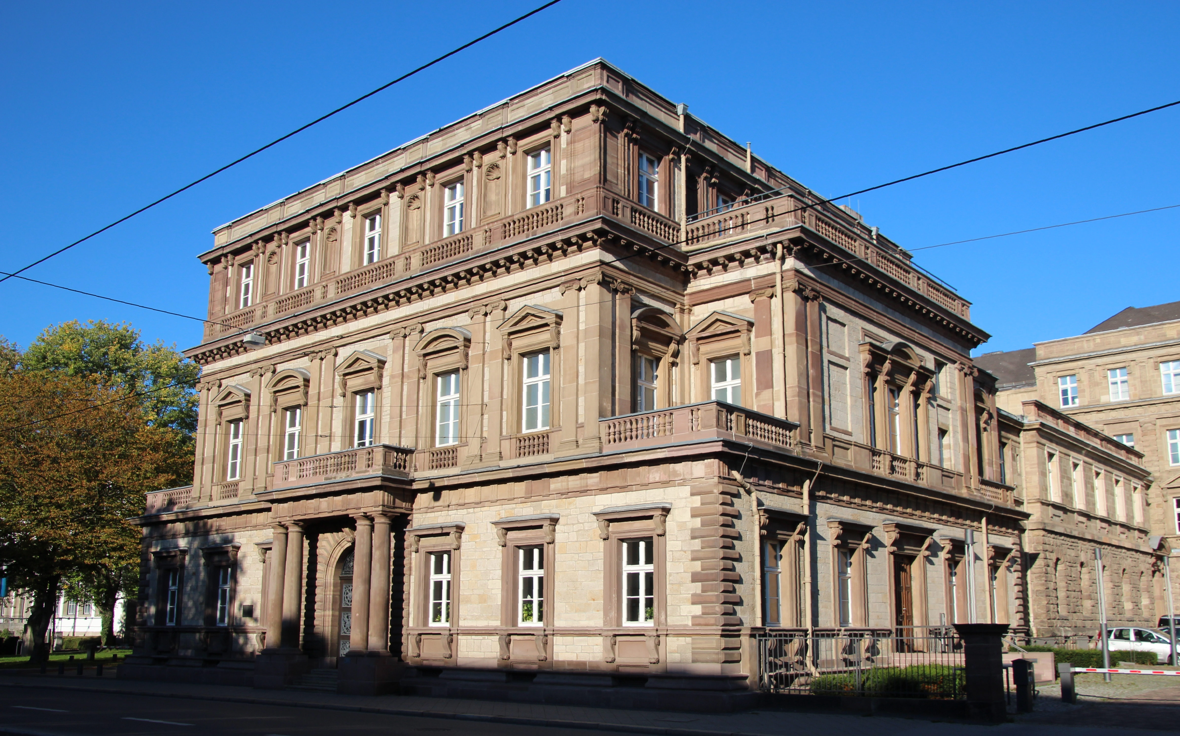 Ständehaus, Ständeplatz 6–10 in Kassel